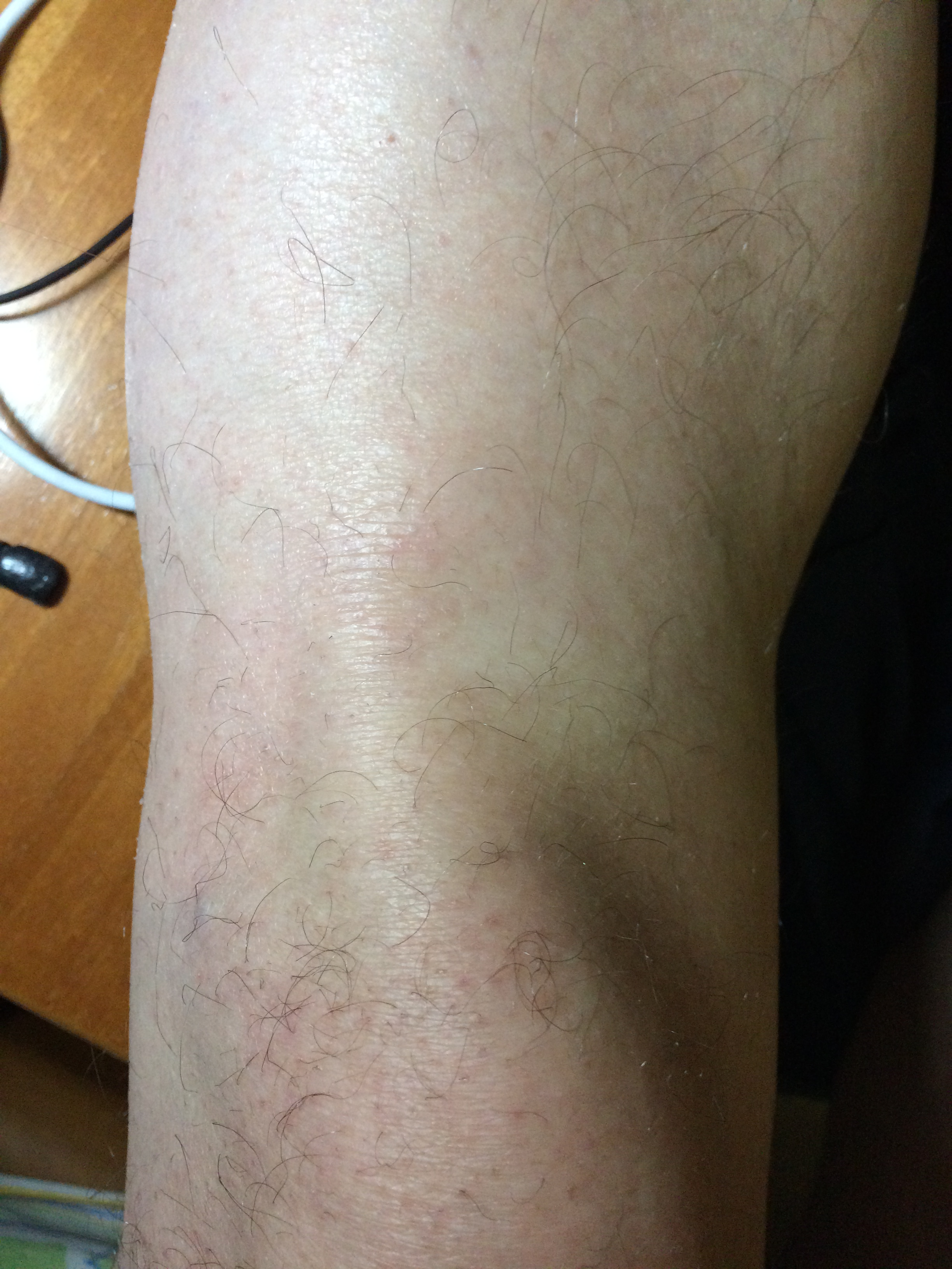 Micosi Fungoide dopo applicazione di Sole ed olio di Cartamo